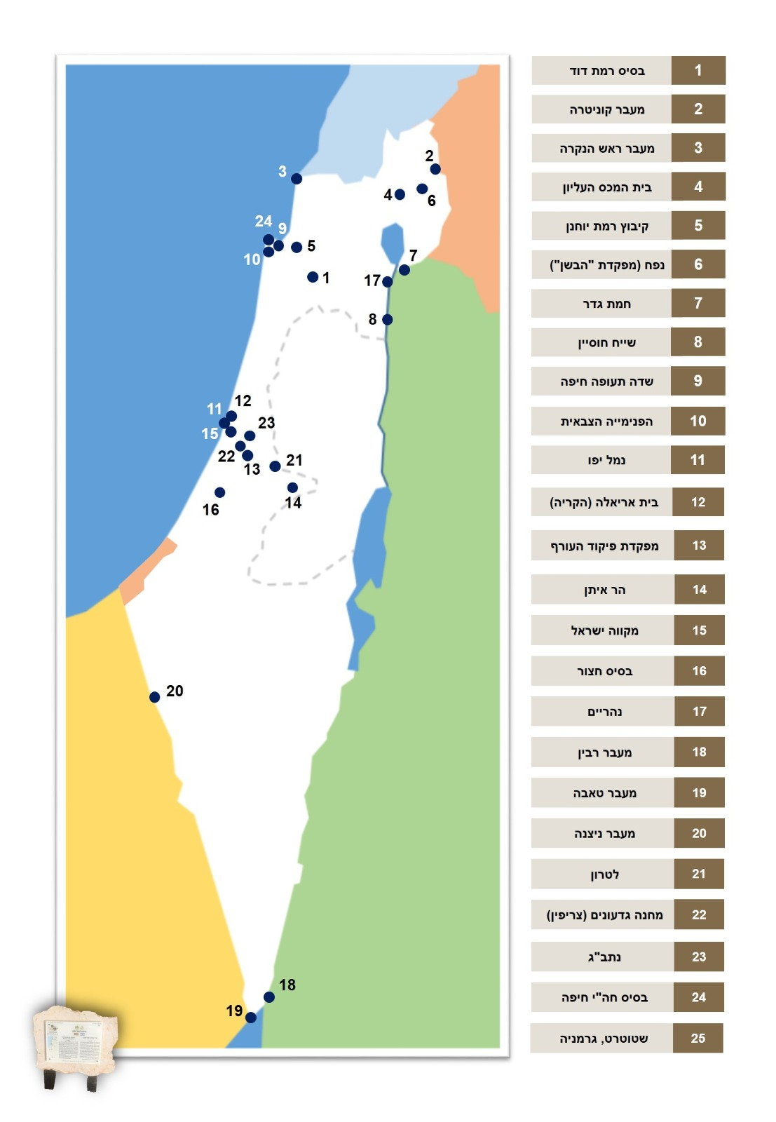 מפת פרוקיט המורשת של חטיבת קשרי החוץ (קש"ח) של צה"ל, חץ הדורות